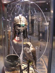 Gravfynd från Valsgärde gravfält